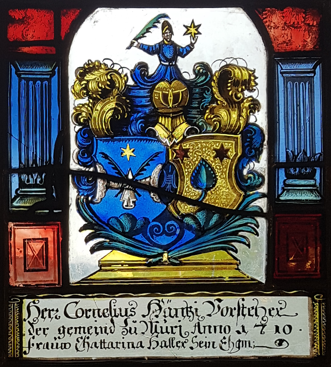 Kirche Muri BE, Allianzwappen Henzi Haller